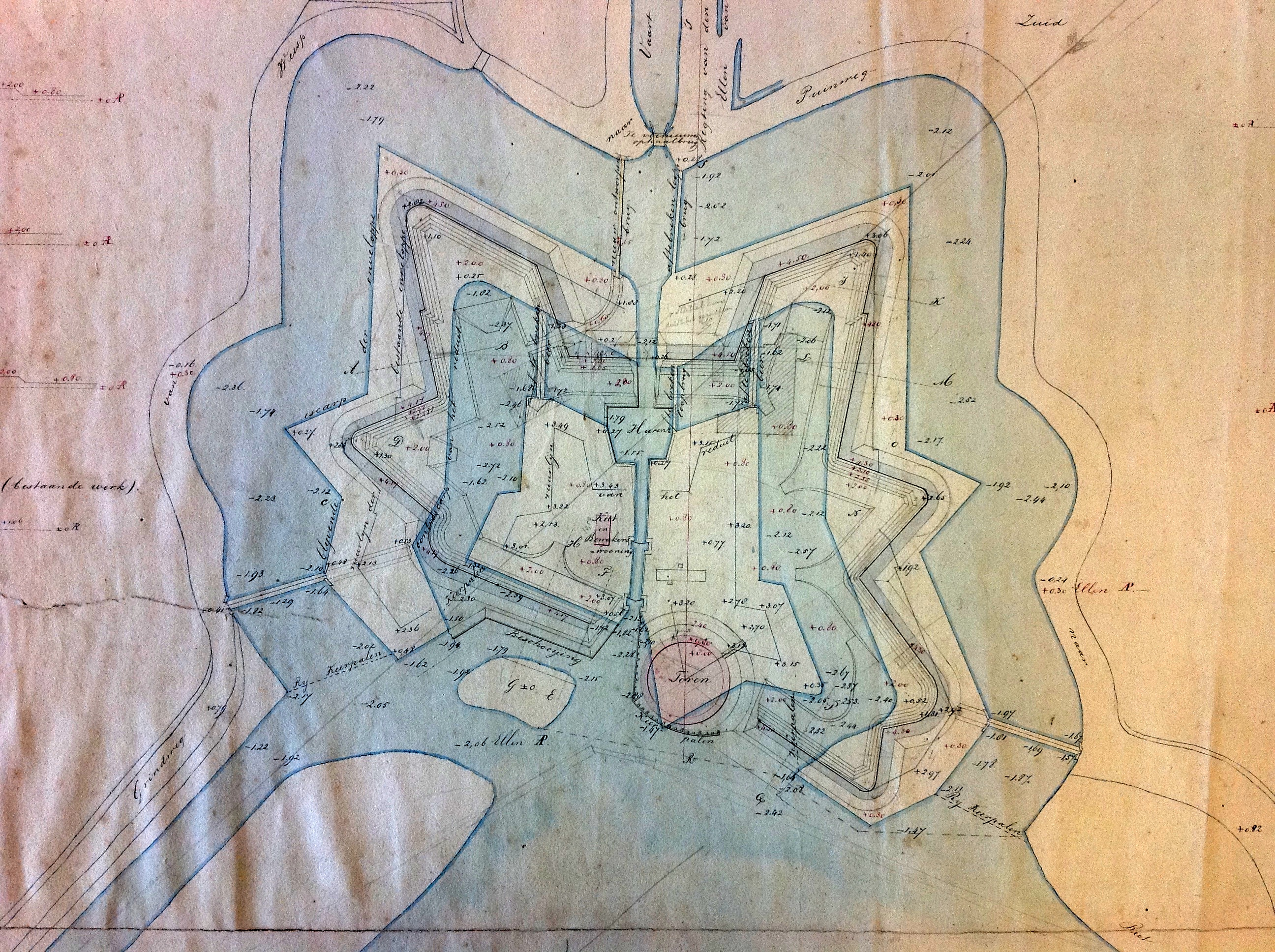 Fragment van bestektekening uit 1845 met aanpassingsplannen voor het Fort Uitermeer. Origineel gezien in Het Utrechts Archief. Titel op blad: Tekening A van het bestek: Het veranderen van het Aardewerk van en het bouwen van eenen Verdegigbaren Toren in het Fort Uitermeer. Verklaring: De blauwe lijnen toonen het bestaande werk aan. De zwarte lijnen stellen de nieuw ontworpen werken voor. De blauwe cijfers wijzen de bestaande hoogten en diepten, de roode die der ontworpene werken aan. Het peil is het Amsterdamsche zoo als dit in de scheidsmuur te Uitermeer op den peilschaal is aangegeven. De (of alle) (onleesbaar) zijn in Ellen uitgedrukt. Ondertekend met: Naarden den 17e October 1845 De Kolonel Directeur der 1ste Fortificatie Directie (get:) Bos De 1e Kapitein en Aanwezend Ingenieur (get:) P:N: van der Kemp ......